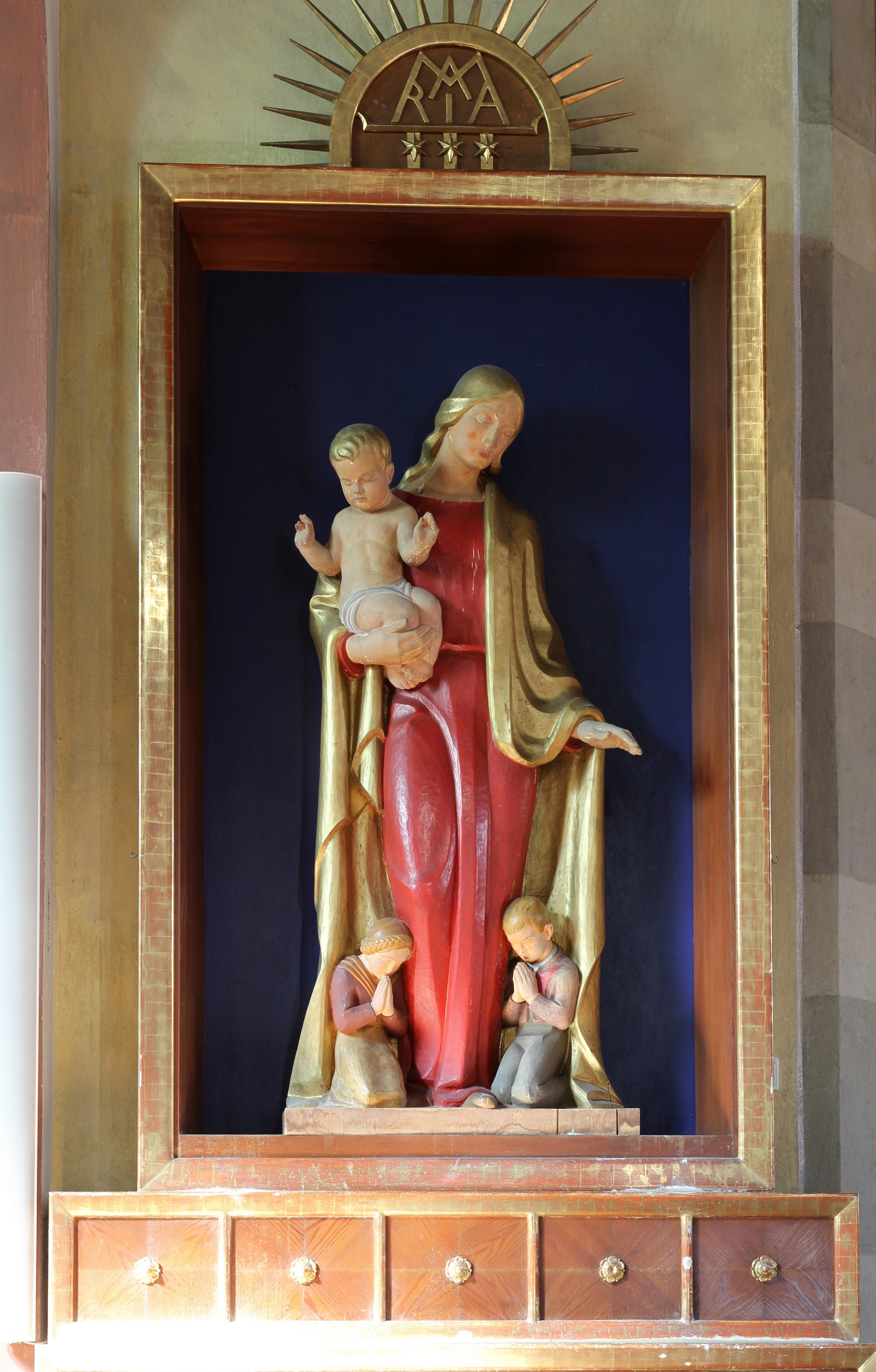 Altar von Hans Plangger in der Pfarrkirche St. Sebastian und Nikolaus in Tscherms